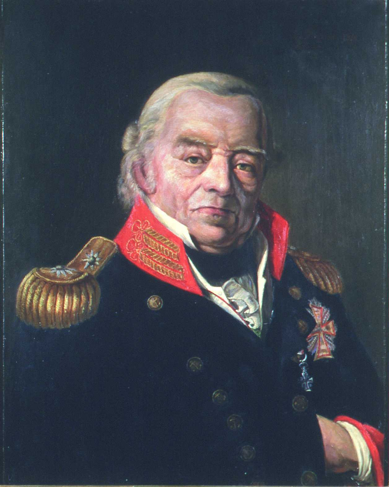 Otto Lütken malt av T. Torgersen fra Eidsvoll 1814. Lütken deltok på Notabelmøtet i 1814.